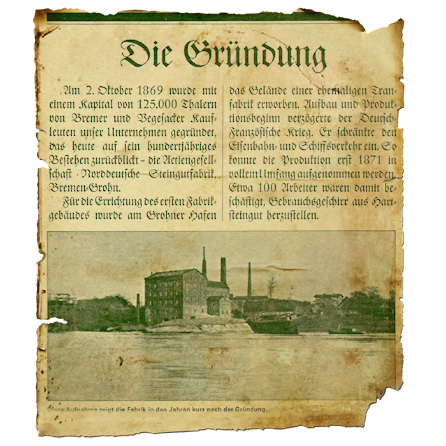 Gründungsbericht. Norddeutsche Steingutfabrik Bremen-Grohn